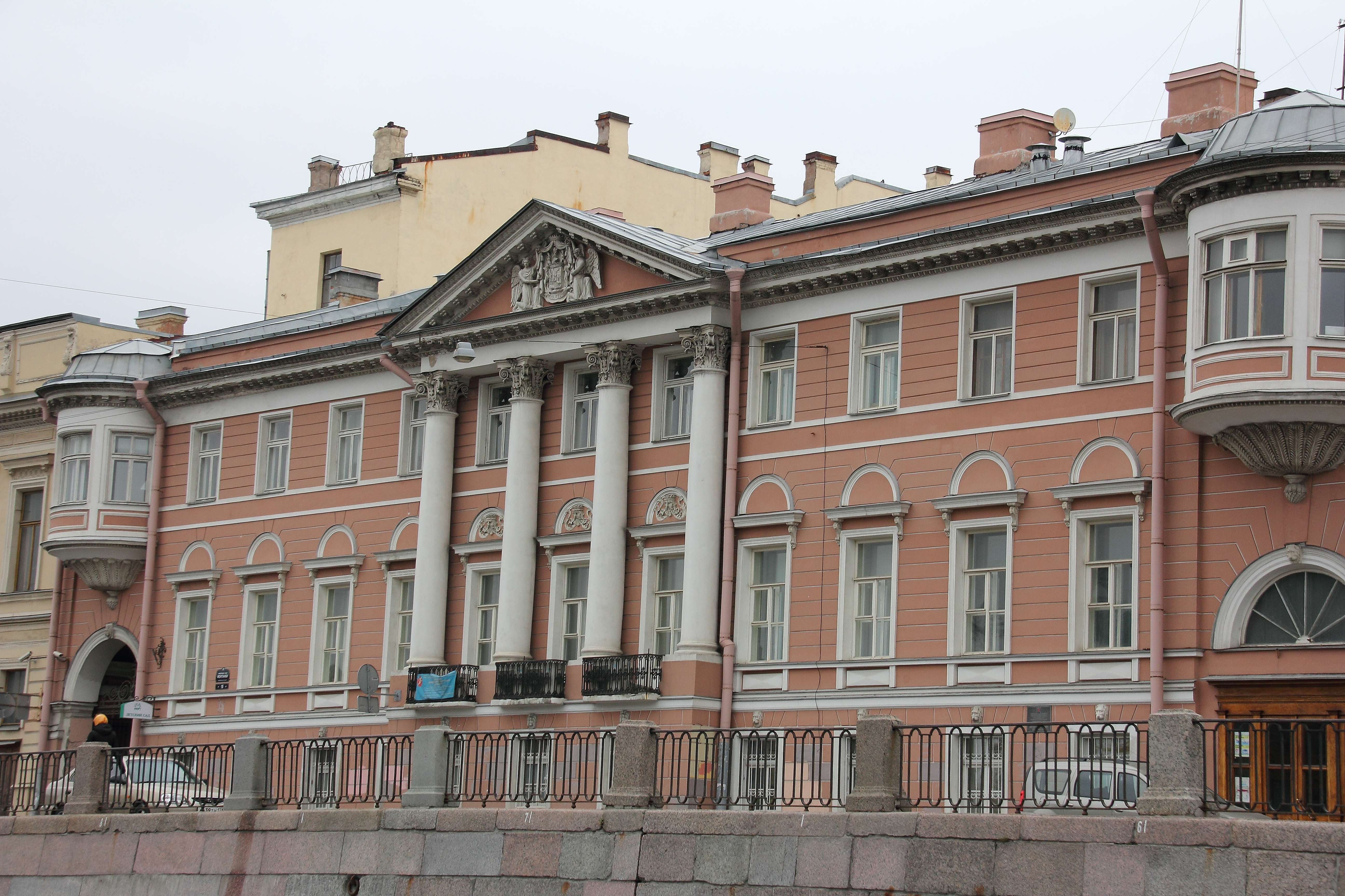 Дом Пашковых (Санкт-Петербург, р. Фонтанки наб., 18)